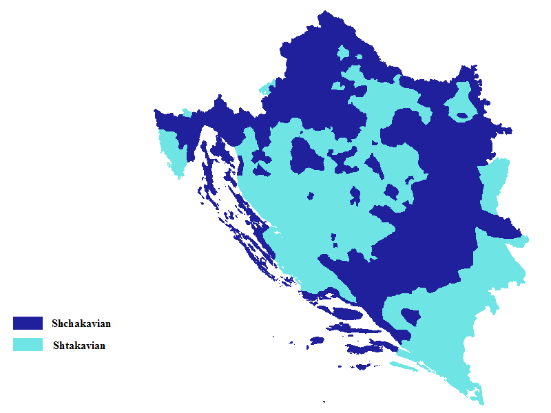 Šća-šta isoglosa